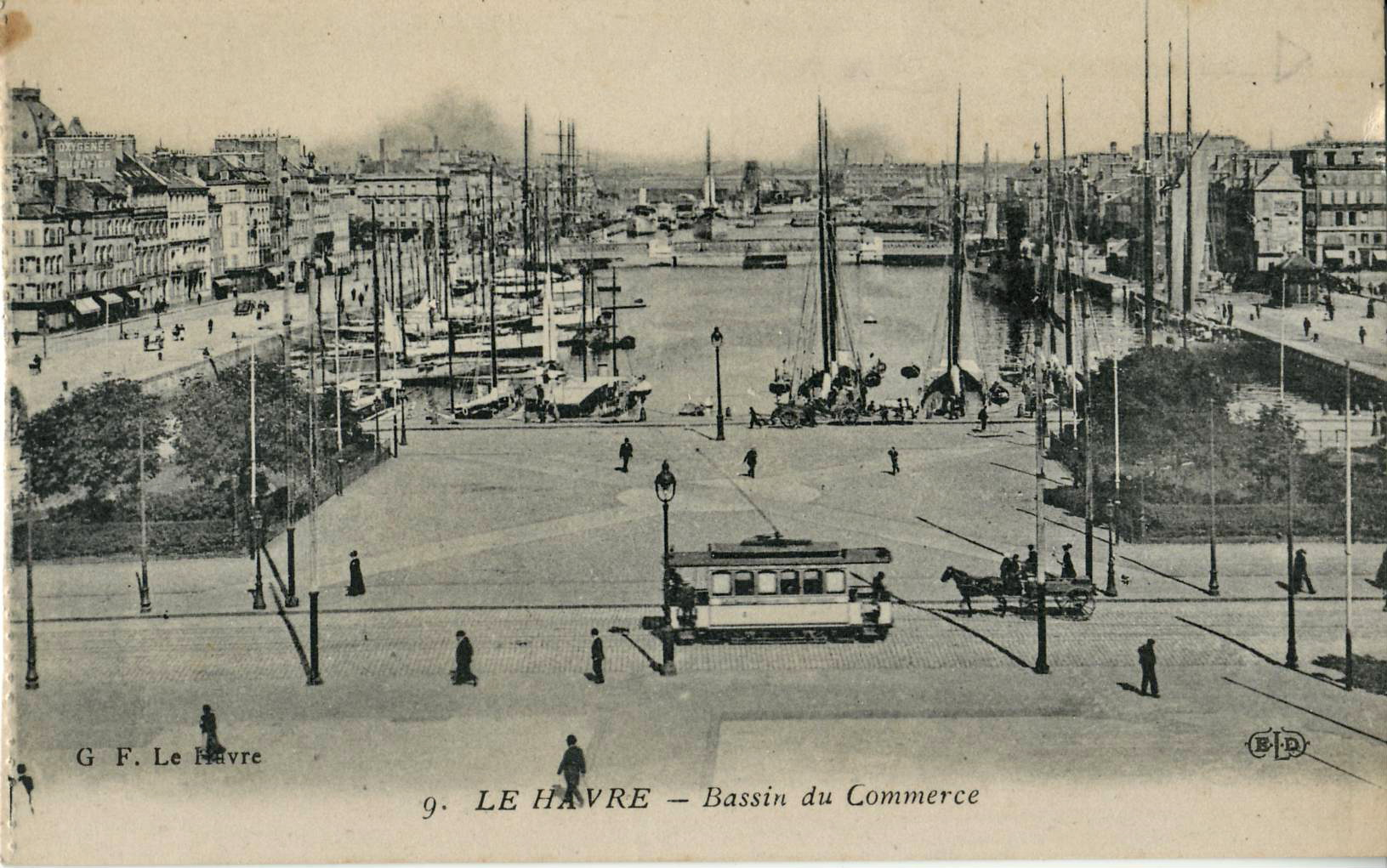 Carte postale ancienne éditée par ELD, n°9 : Le Havre - Bassin du Commerce